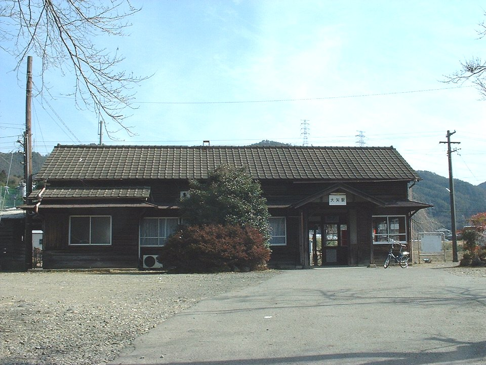 大矢駅